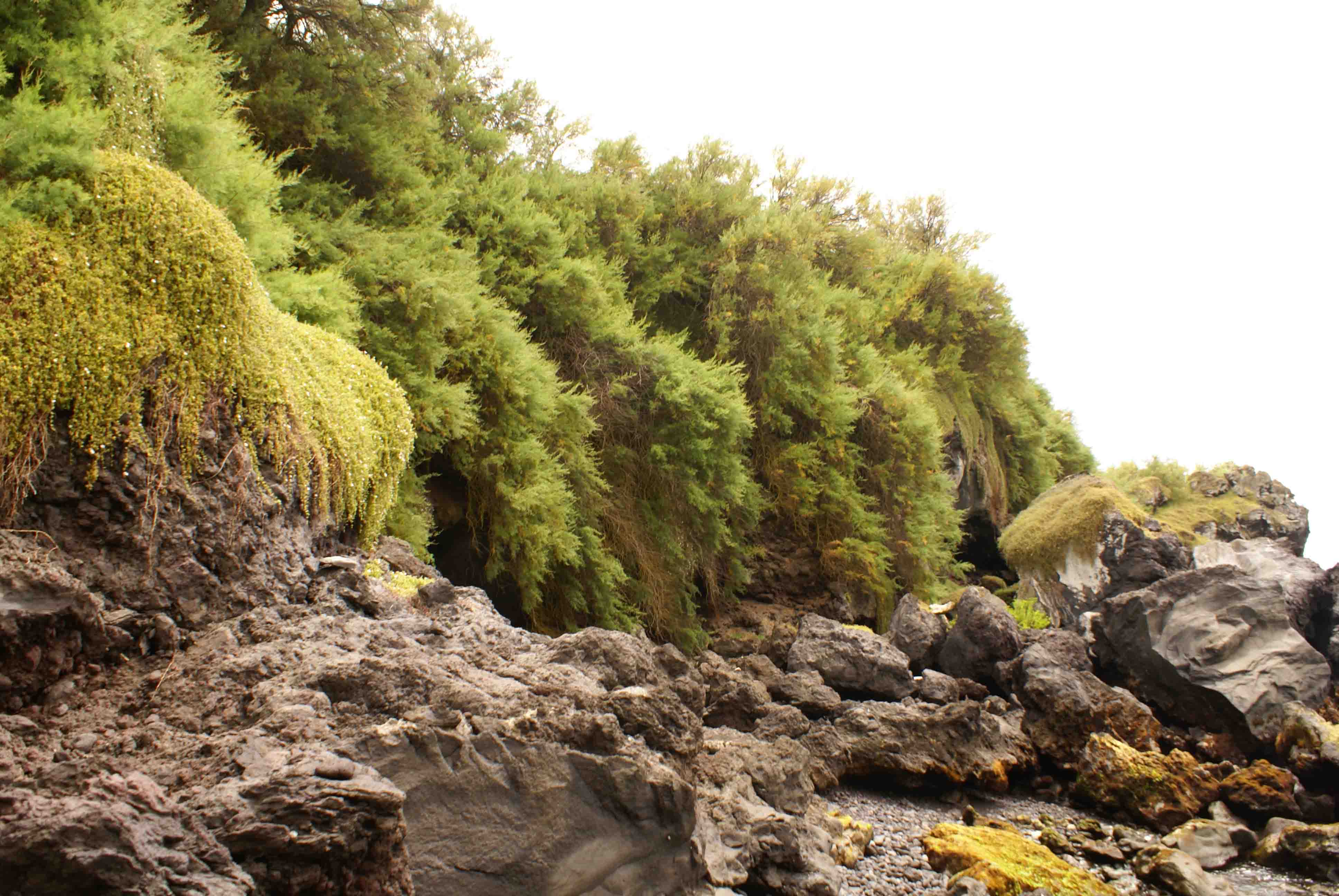 Vegetação junto à costa de uma das enceadas que dão forma à Baía de Vila Maria, ilha Terceira, Açores, Portugal